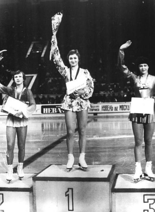 Carola Weissenberg, Kira Iwanowa, Marina Ignatowa PI-Tass-11.12.78 Moskau: Mit einem Schaulaufen ging am 11.12.78 der Eiskunstlaufwettbewerb um den Preis der Zeitung Nouvelles de Moscou zu Ende. Die 15jährige Berlinerin Carola Weissenberg errang den 1. Platz. Sie hatte den Grundstein zum Sieg bereits durch eine ausgezeichnete Pflicht gelegt, danach aber auch in der Kür eine überzeugende Leistung gezeigt. Platz 2 belegte Kira Iwanowa (UdSSR), Platz 3 Marina Ignatowa (UdSSR).